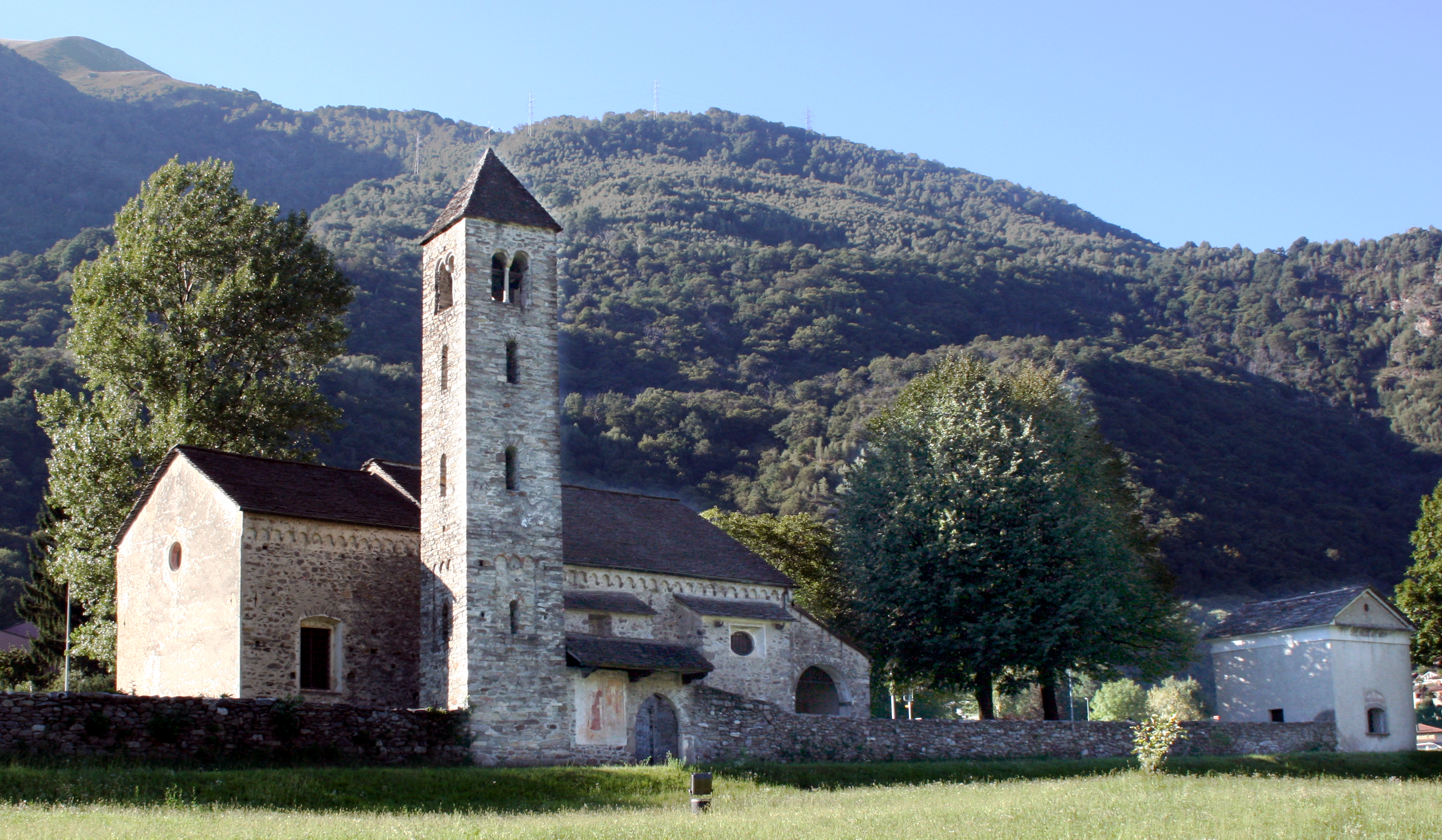 Chiesa di san Mamete, lato est con il campanile